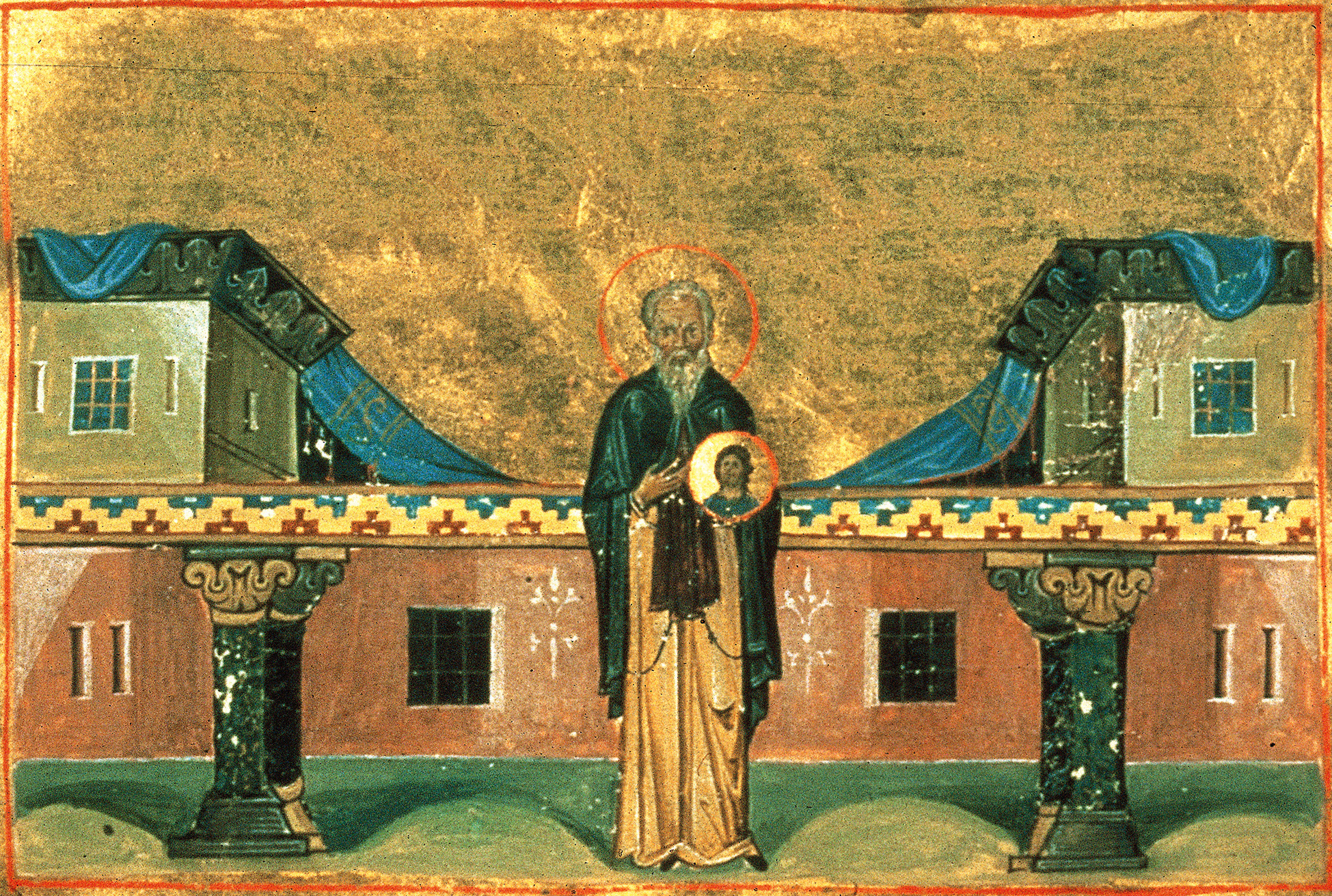 Преподобный Никита Исповедник Константинополь. 985 г. Миниатюра Минология Василия II. Ватиканская библиотека. Рим.